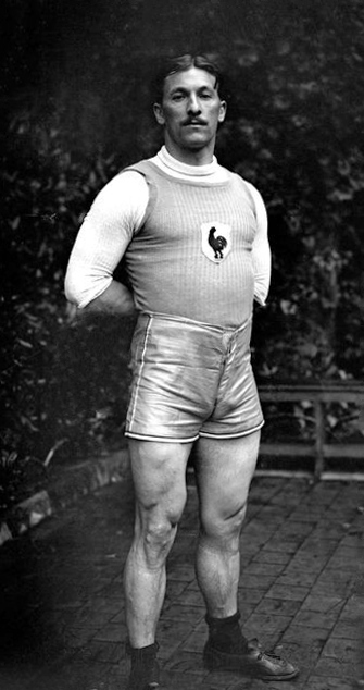 Henri Gance est un haltérophile français qui a été champion olympique en 1920 à Anvers dans la catégorie -75 kg.